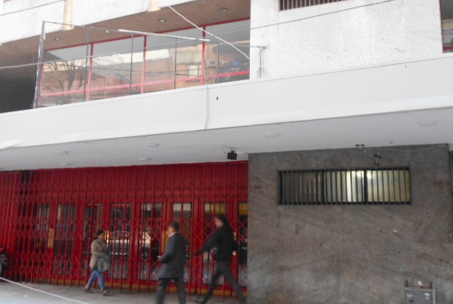 Teatro IFT